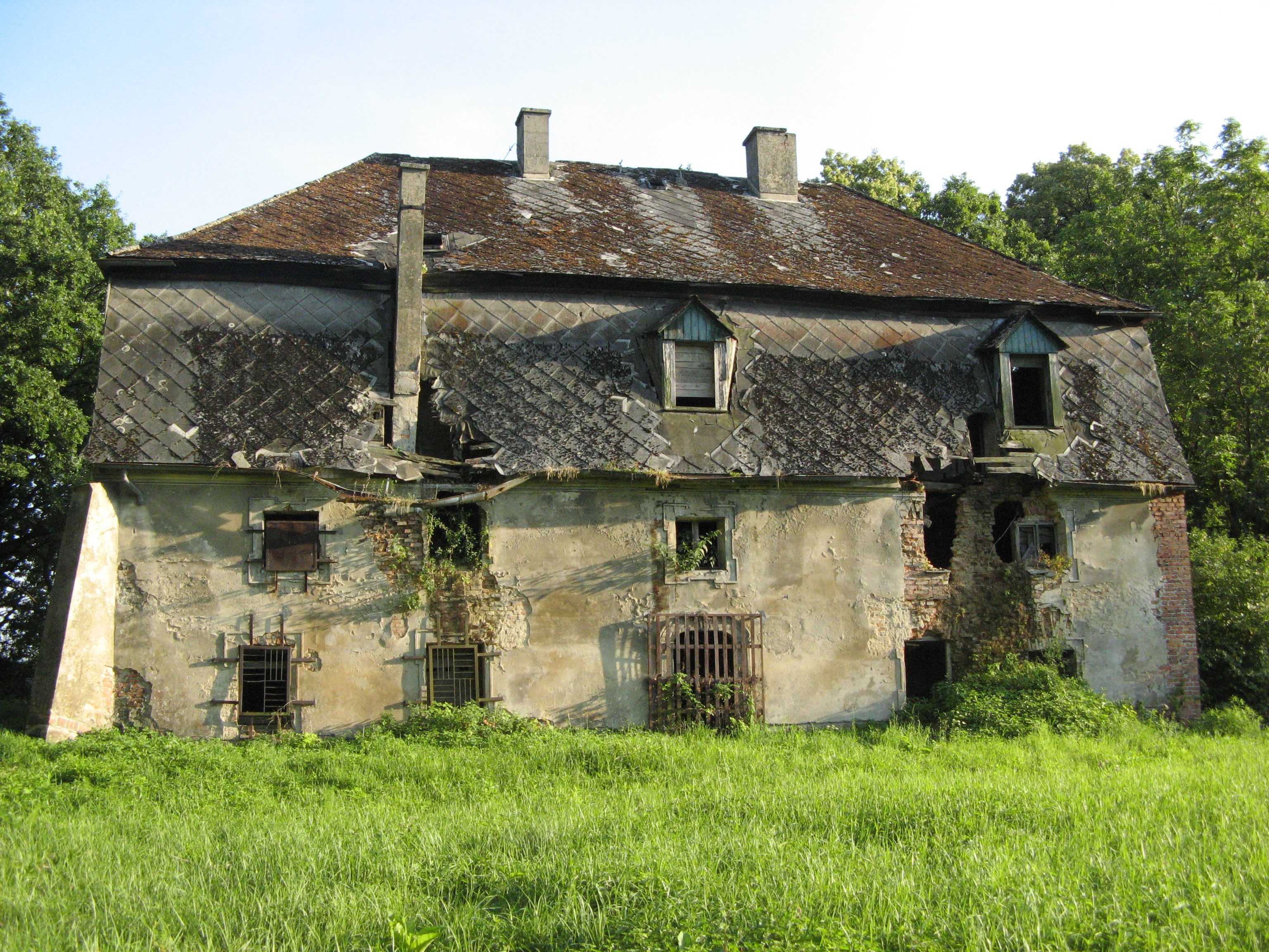 Rezerwat przyrody Łężczok koło Raciborza, ruiny pocysterskiego, zabytkowego dworku myśliwskiego zlokalizowanego w obrębie rezerwatu. Obiekt zabytkowy. Obecny stan zachowania - ruina